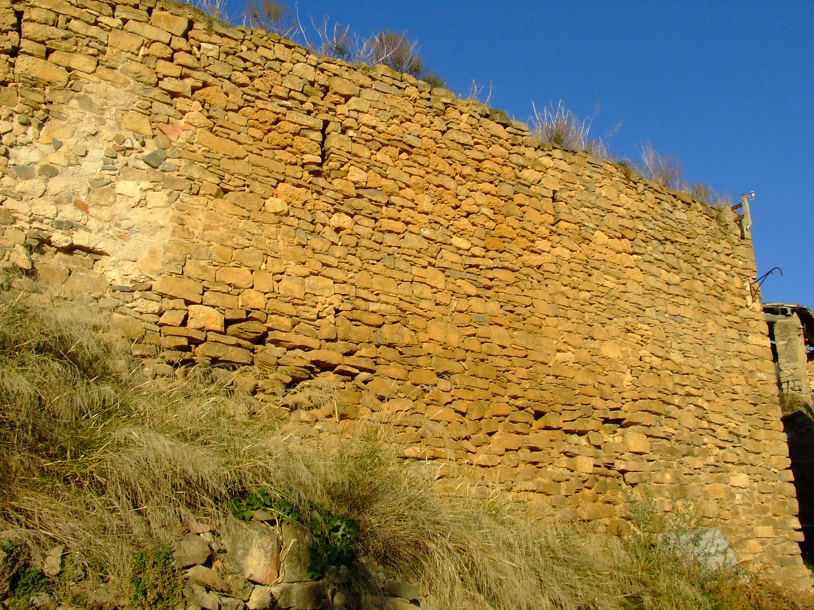 Fragments conservats del castell de Basturs (Orcau, Isona i Conca Dellà, Pallars Jussà)